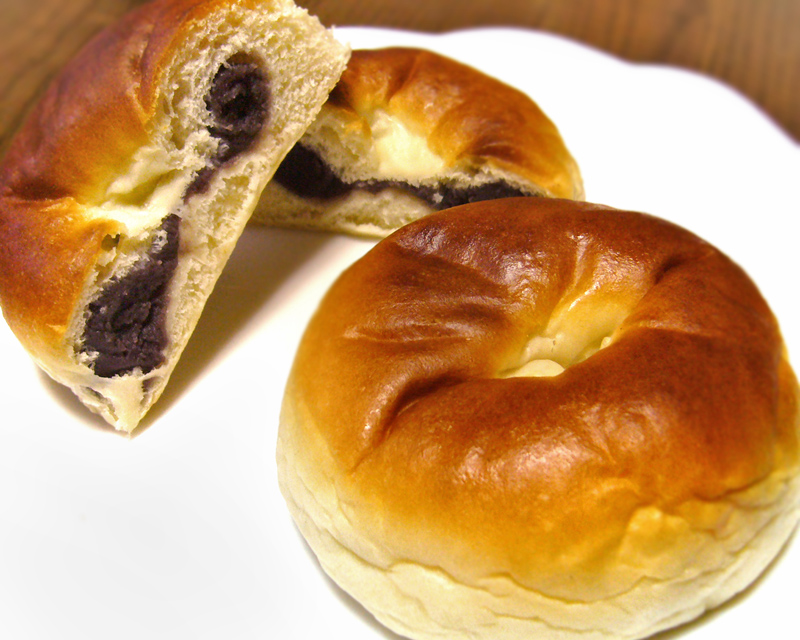 bean-jam-bun,anpan,katori-city,japan